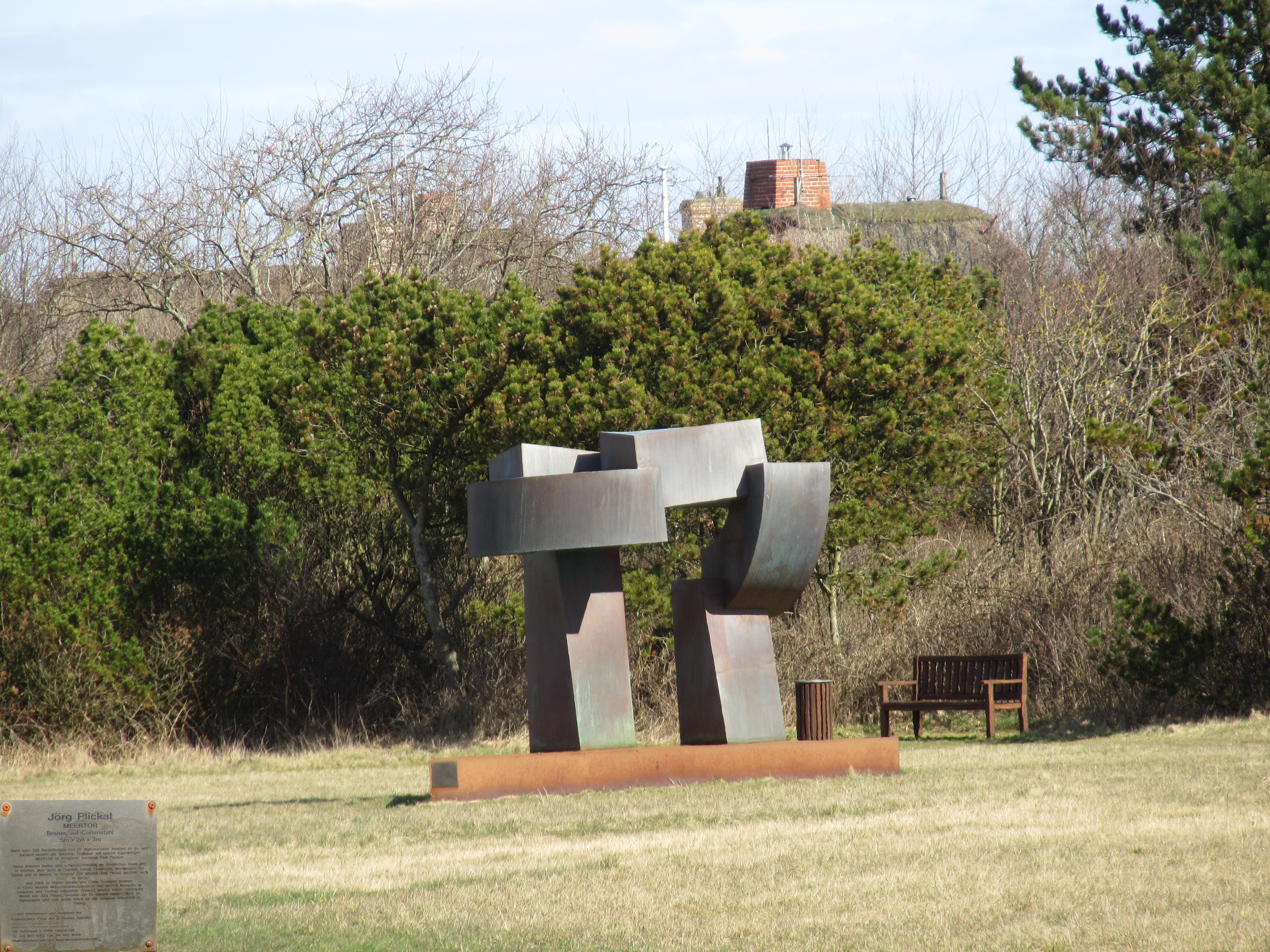 Skulptur MEERTOR (Bronze auf Cortenstahl) von Jörg Plickat, Sylt, Kampen, seit 2011 im Avenarius-Park